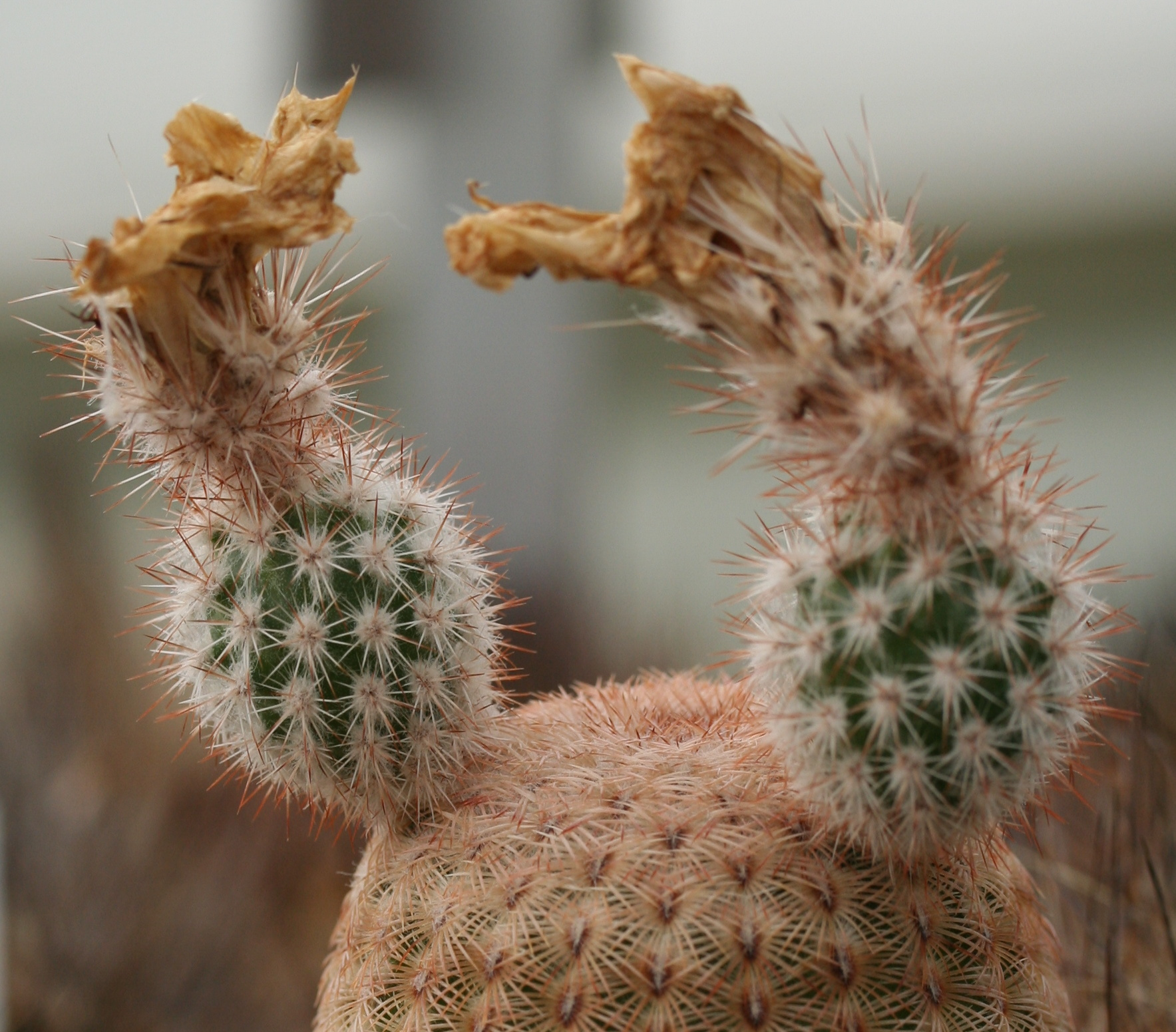 unreife Frucht an Echinocereus rigidissimus subsp. rubispinus L88, weißblühende Form